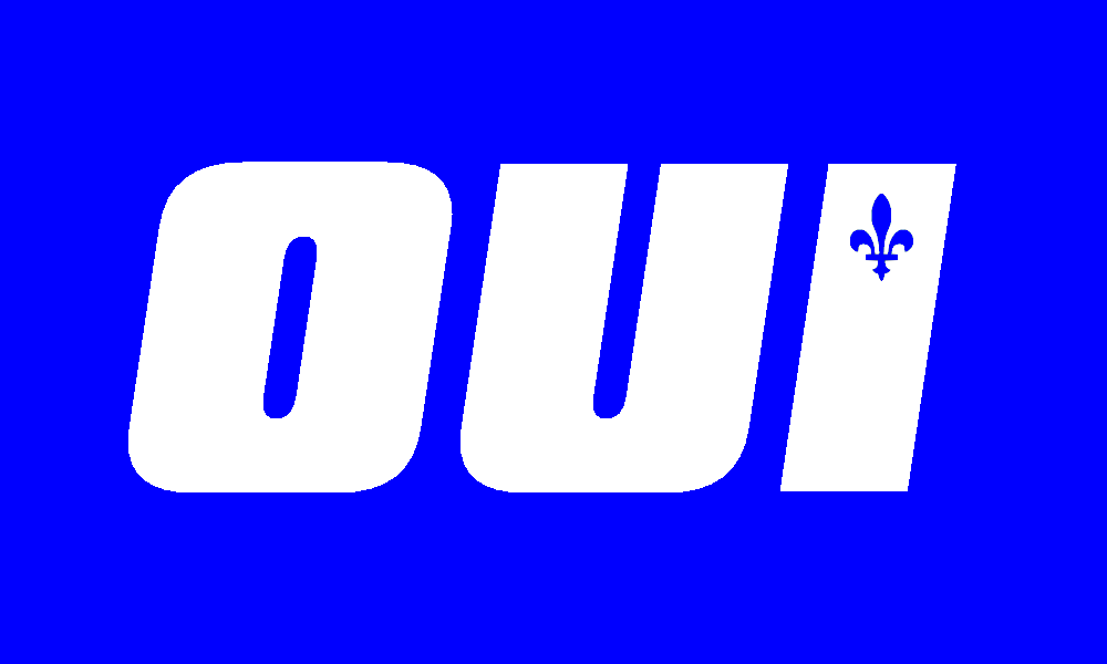 Logo du comité du OUI du référendum souveraineté association